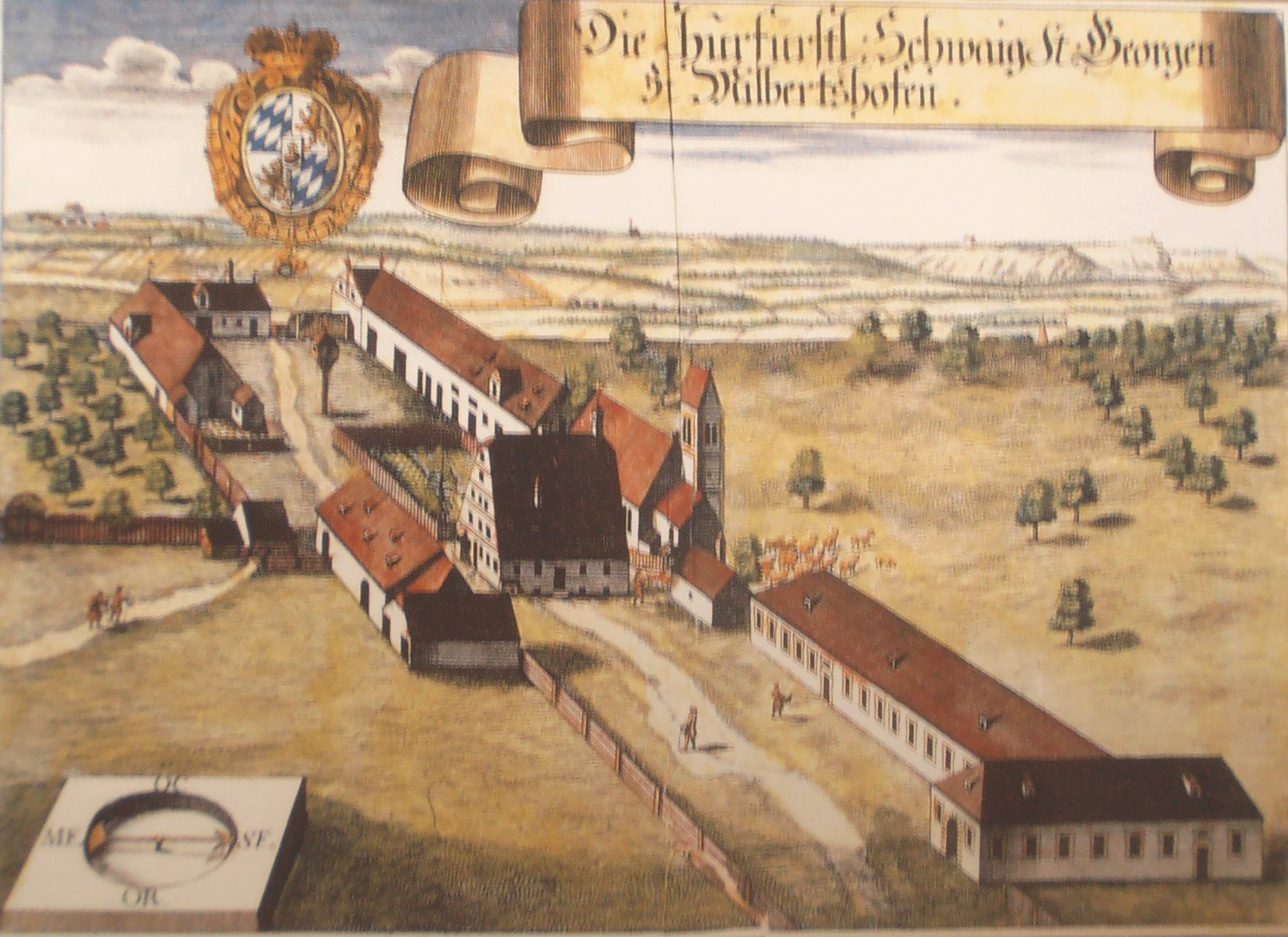 Milbertshofen 1701, Stich von Michael Wening